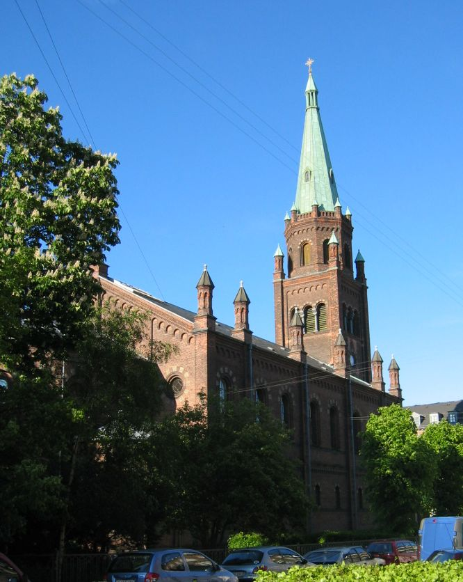 Sankt Matthæus Kirke i København i eftermiddagssol, fotograferet 31. maj 2006.